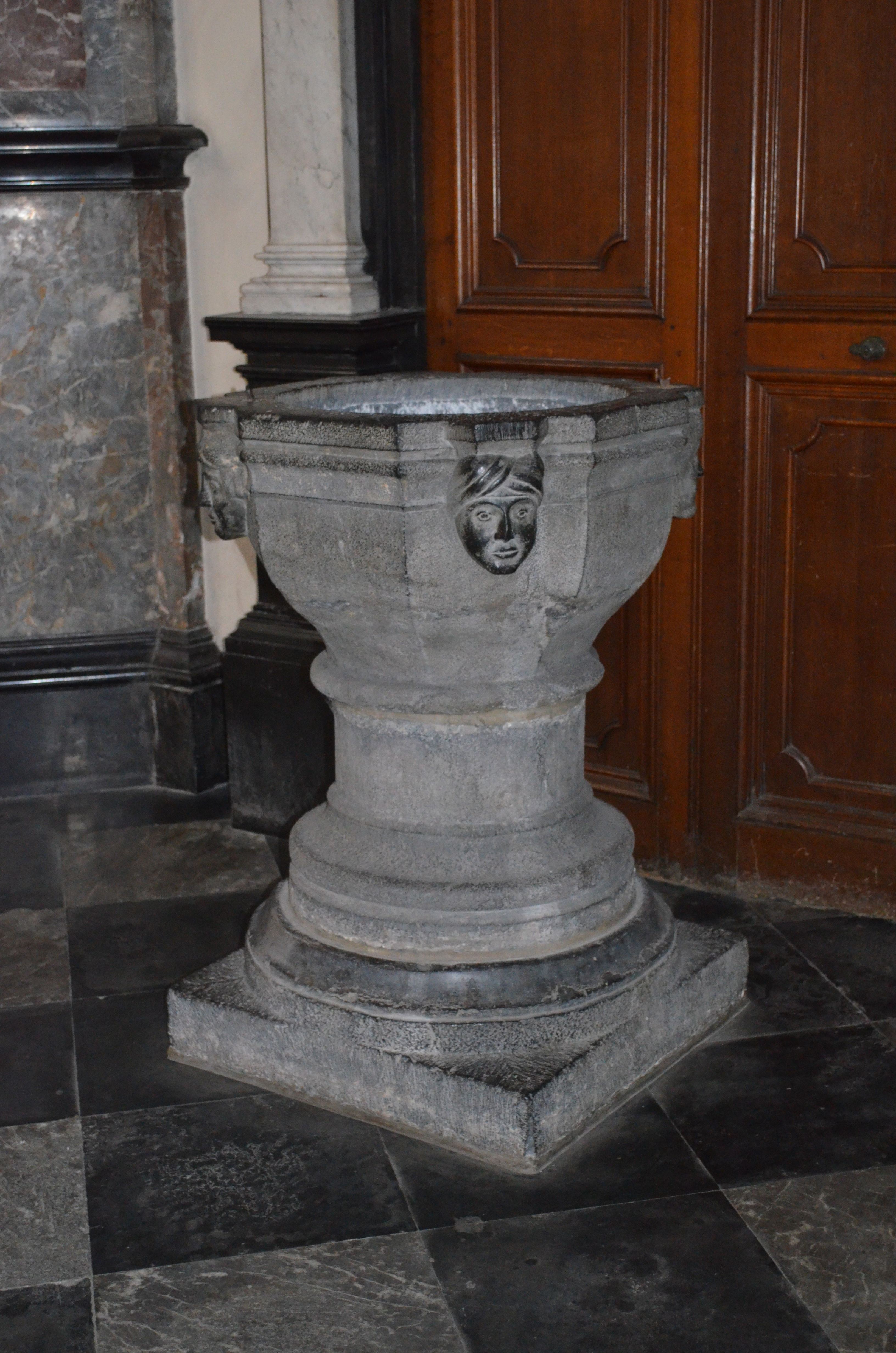 Cathédrale Saint-Aubain de Namur - Fonts baptismaux